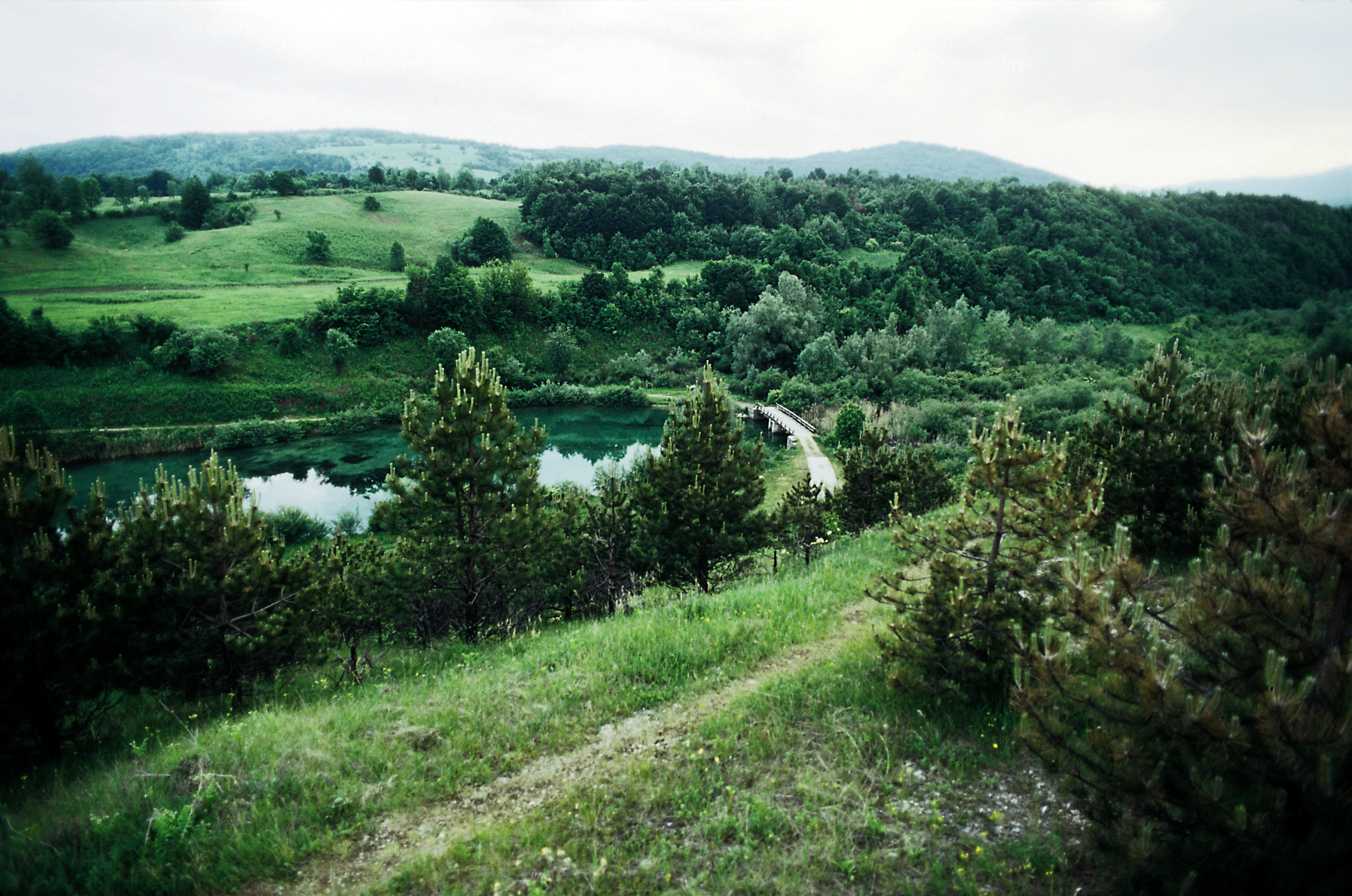 Unterhalb von Selište Drežničko außerhalb des Natinalparkes, das Wasser ist trotzdem noch glasklar – und hier ist das Baden nicht mehr verboten.